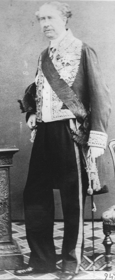 Alessandro Manfredi Luserna d'Angrogna, immagine di corte.